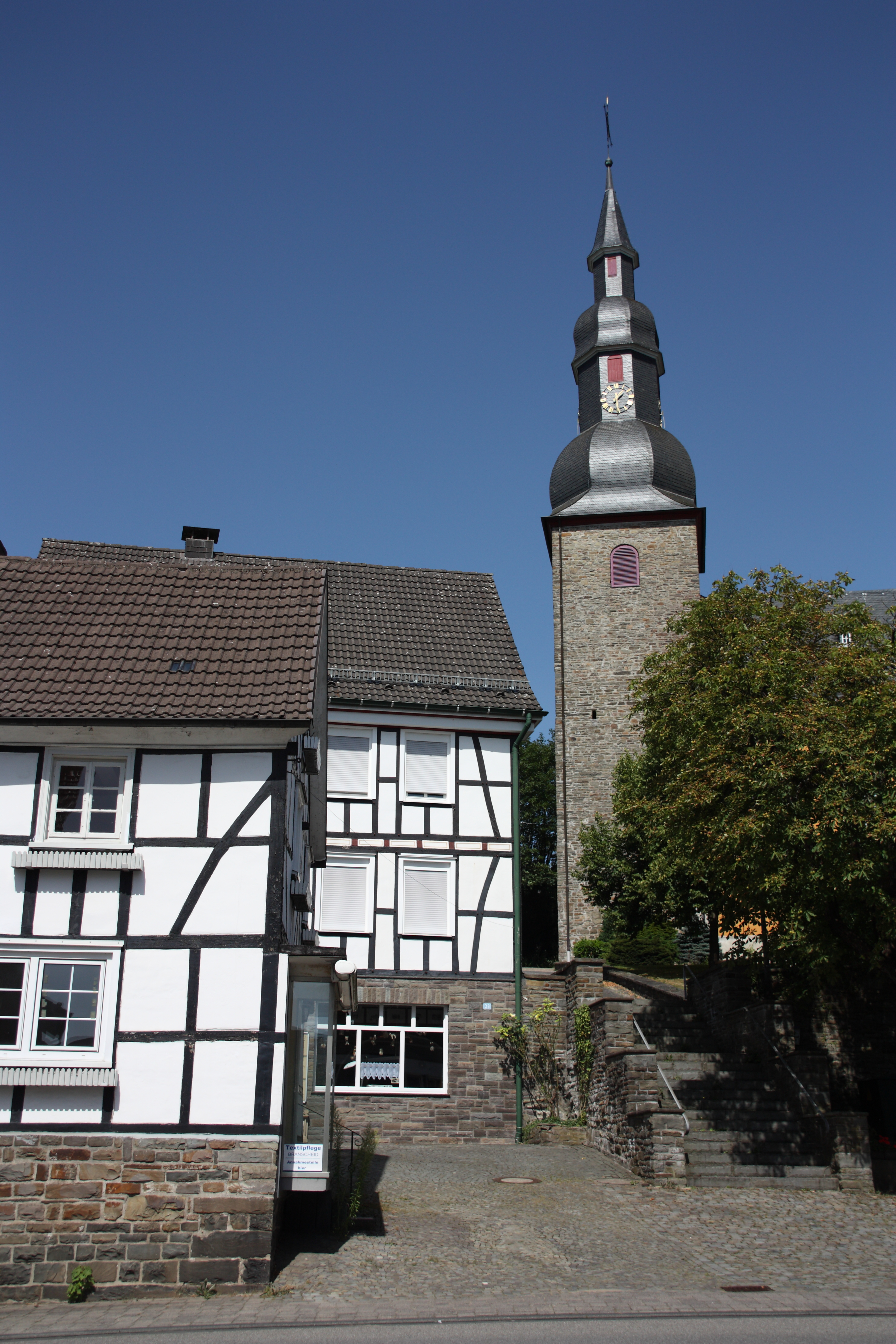 Eckenhagen Altstadt